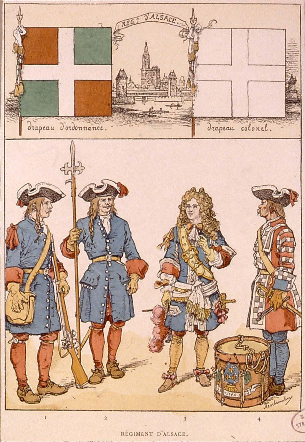 Régiment d'Alsace: 1. Grenadier (1696) 2. Sergent (1696) 3. Officier (1676) 4. Tambour (1696)